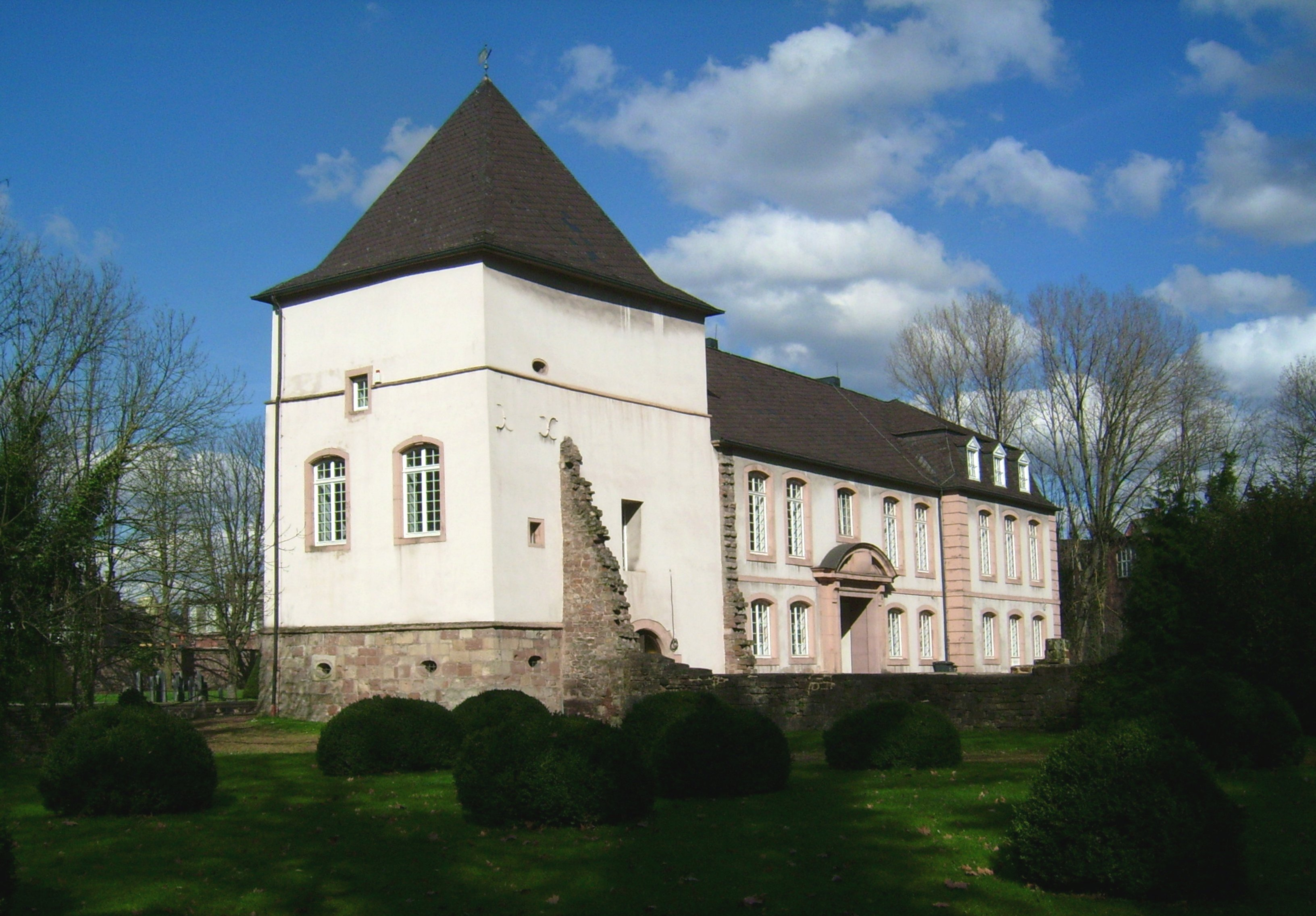 Altes Schloss in Dillingen/Saar, Rückseite